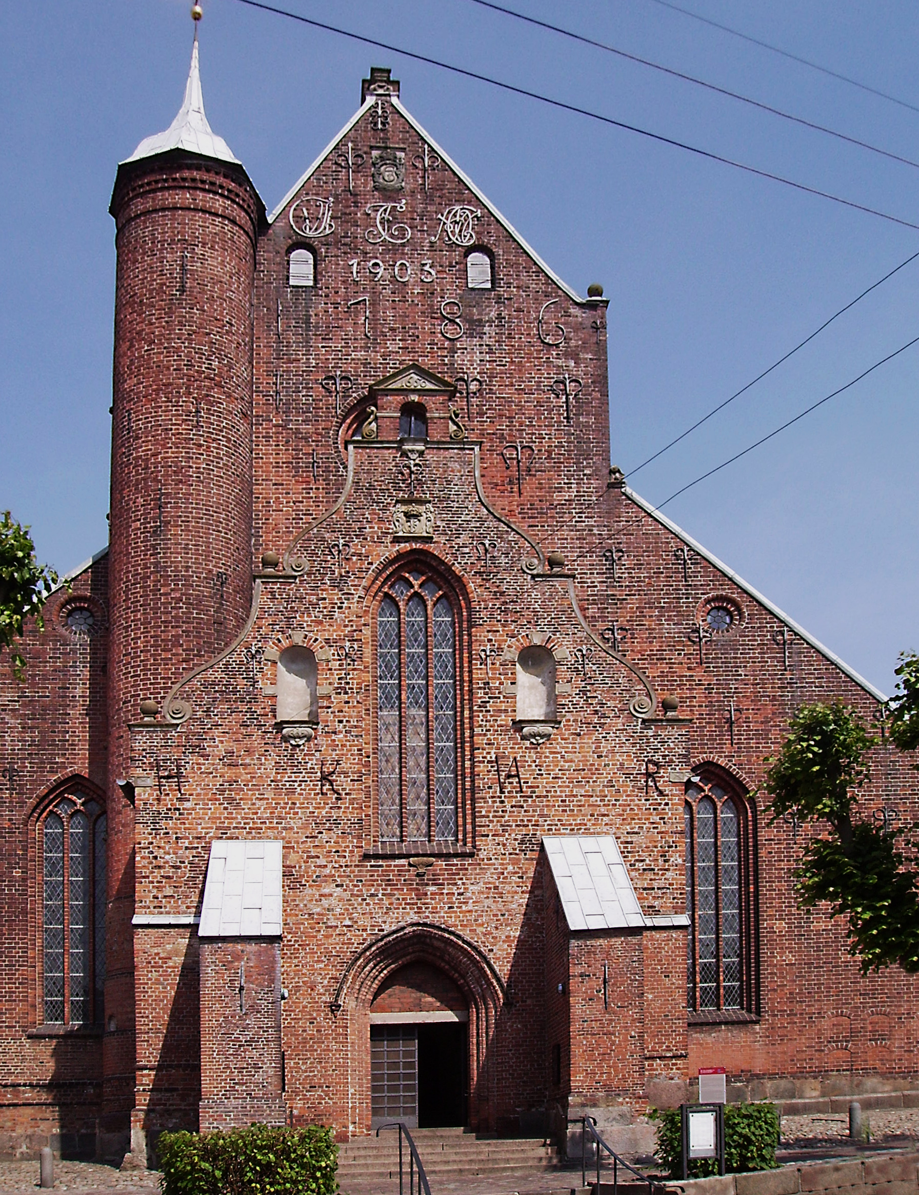 Haderslev Domkirke, Haderslev Stift, Haderslev Herred, Haderslev Amt, Denmark (Danish Church)